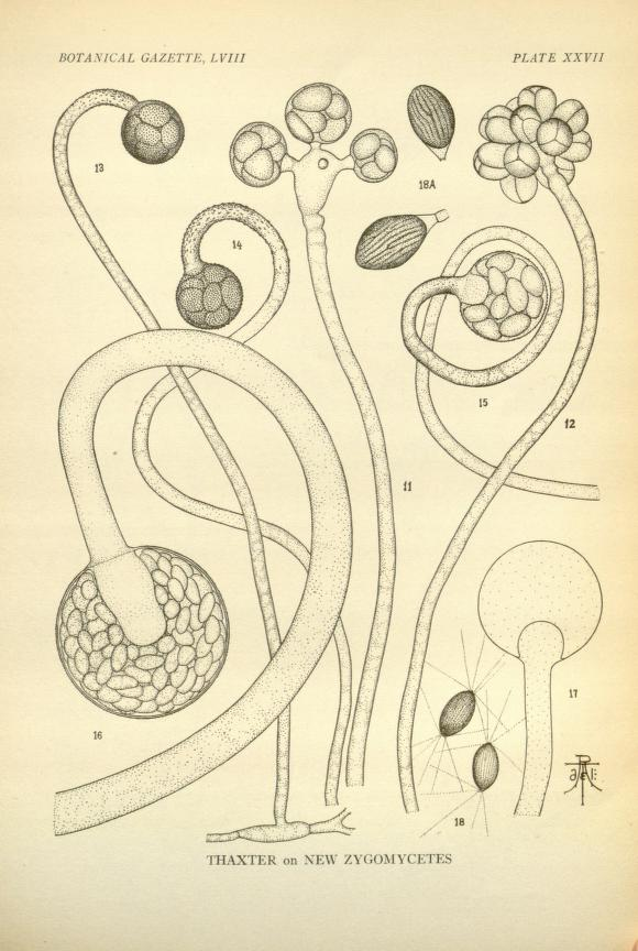 Plate LVIII from Botanical Gazette 58 (1914)